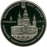 Єлецький Свято-Успенський монастир аверс